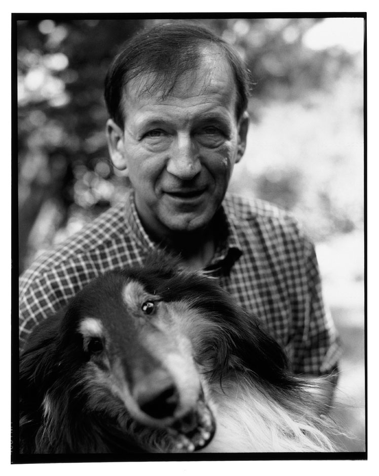 Auteursfoto Maarten Jagermeester